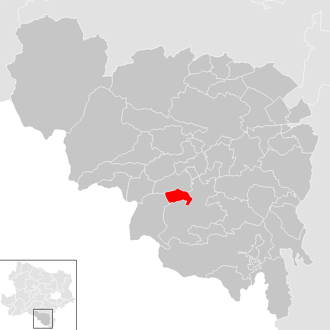 Bezirk Neunkirchen